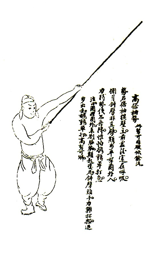 Metodo de Baston, 1621 D.C.